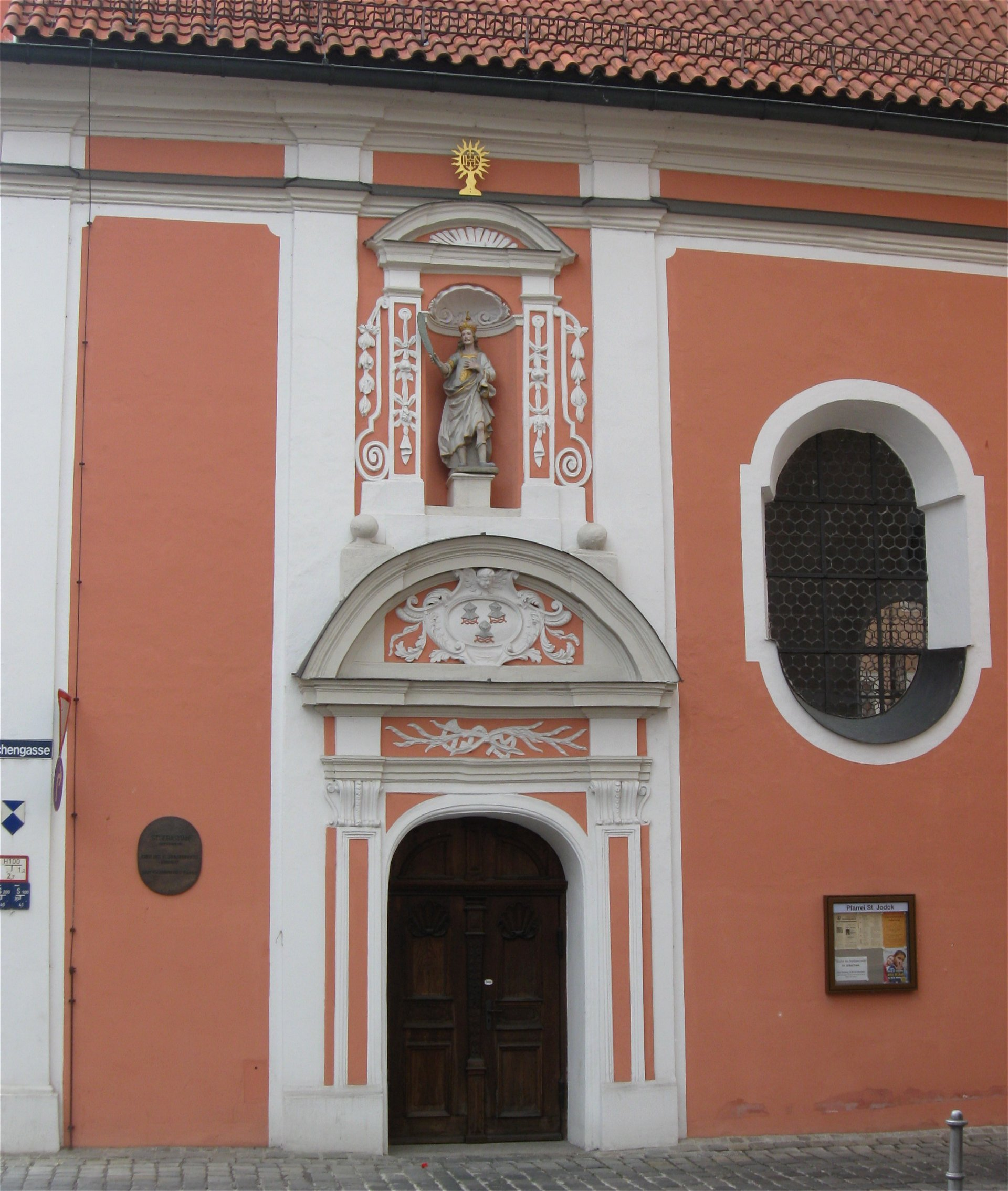 Litschengasse 716; Katholische Kirche St. Sebastian, im Kern spätgotisch um 1490, 1661 Verlängerung des Kirchenschiffs nach Osten und durchgreifende barocke Umgestaltung; mit Ausstattung. D-2-61-000-338